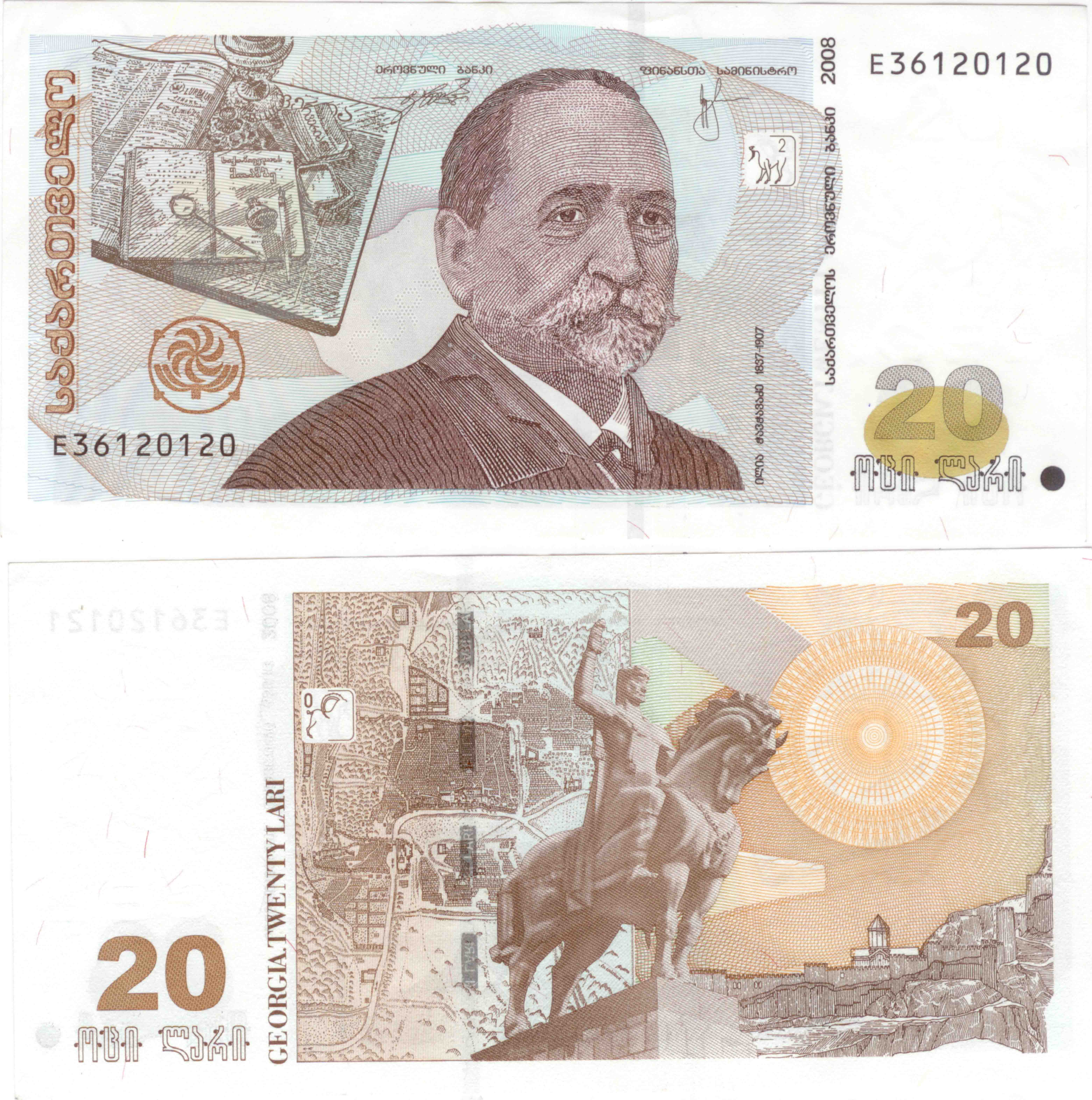 20 лари